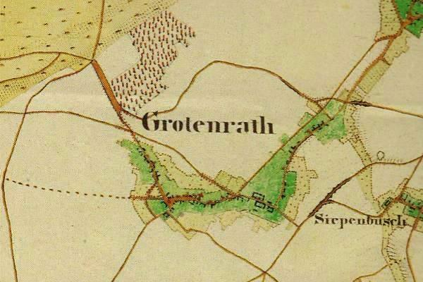 Preußische Kartenaufnahme 1846 - Uraufnahme - (5002 Geilenkirchen)